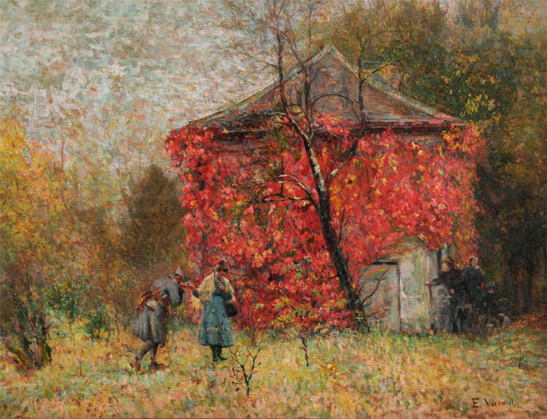 Eliseu Visconti - VOLTA ÀS TRINCHEIRAS - OST - 95 x 125 cm - c.1917 - COLEÇÃO PARTICULAR